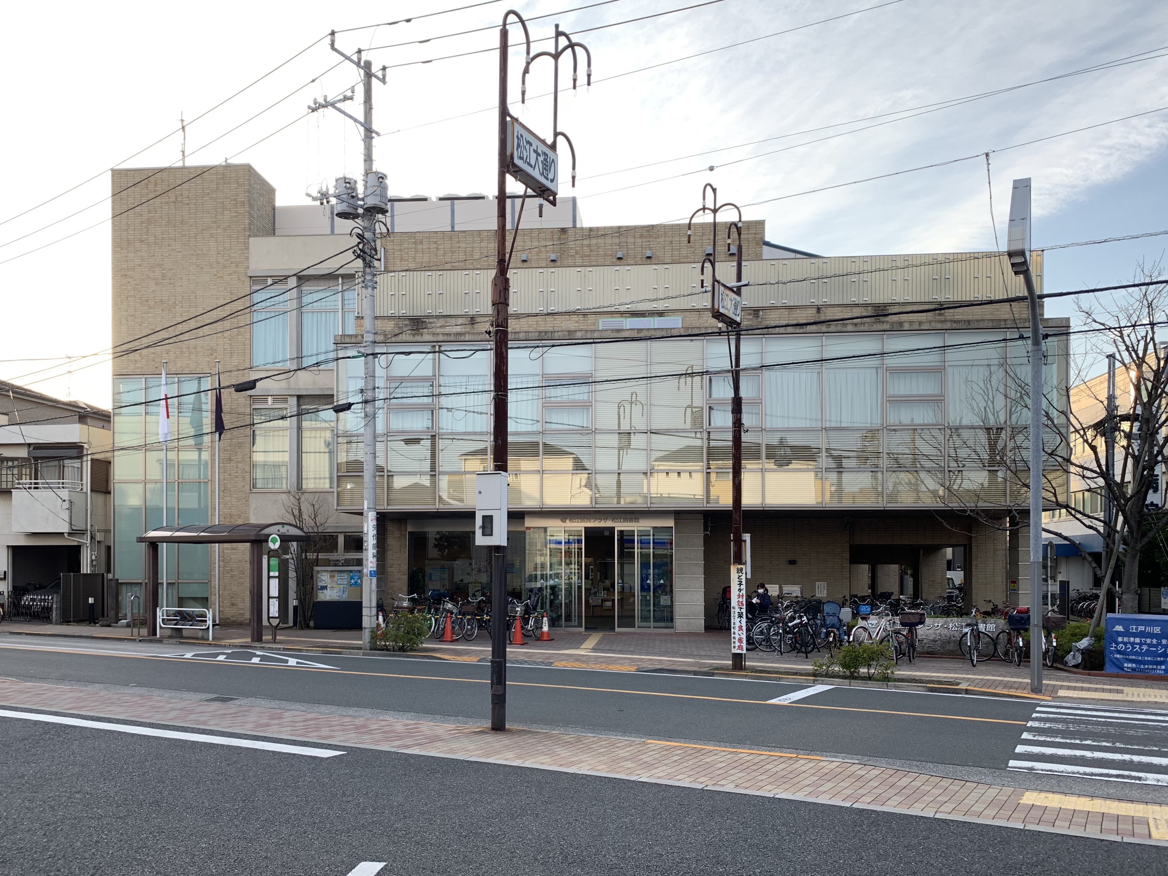 江戸川区立松江図書館が入居する松江区民プラザと都営バスの松江バス停